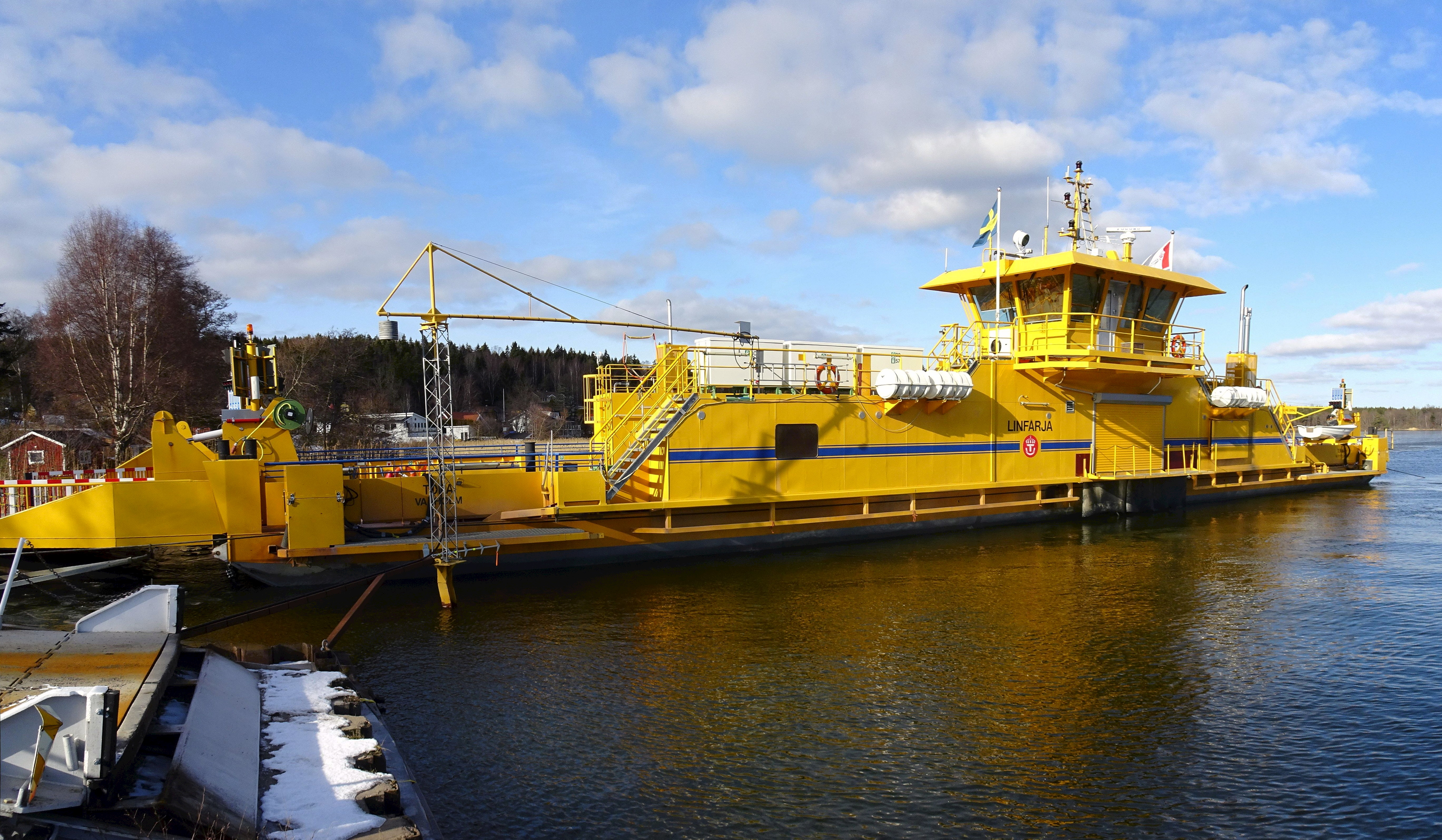 Färja 344 Tora på Lilla Stenby, Adelsö